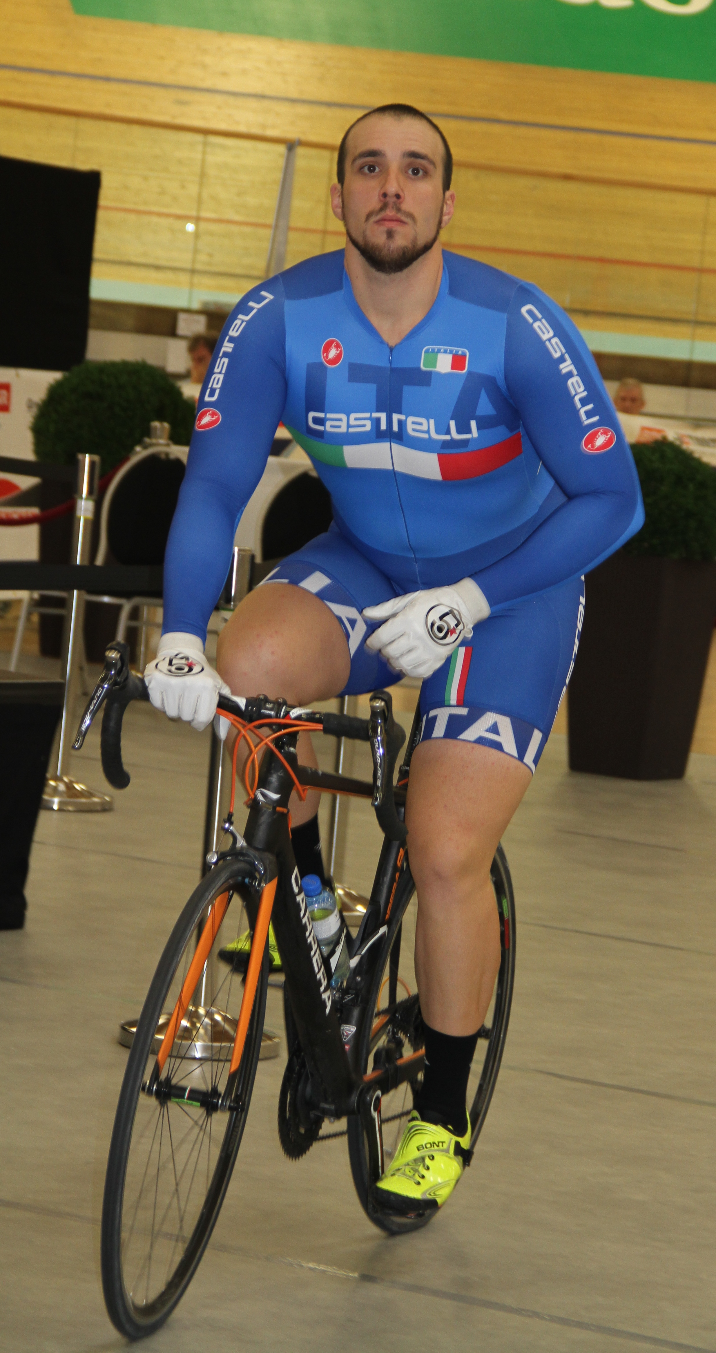 Luca Ceci, italienischer Radsportler The making of this document was supported by the Community-Budget of Wikimedia Germany.